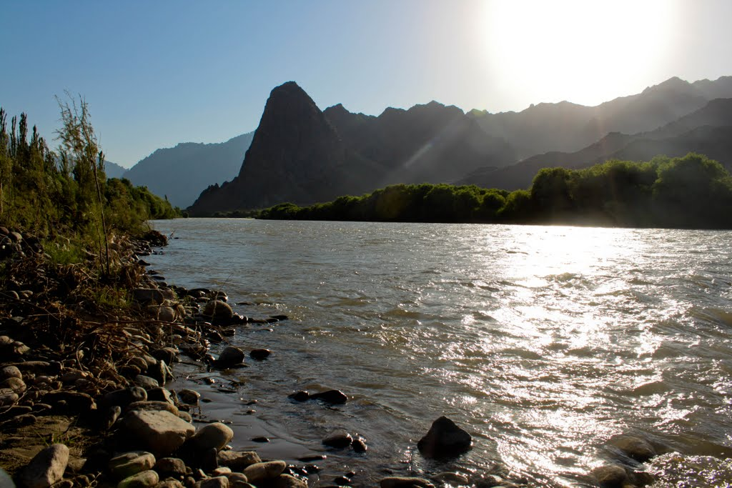 Culfa, Əlincə çayı